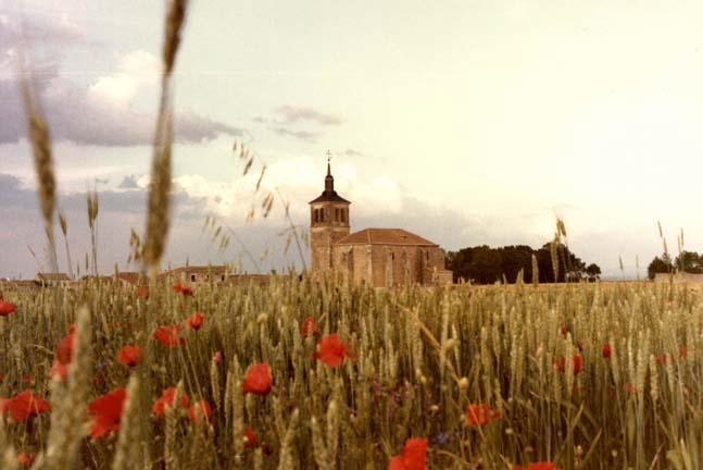 Campo Trigo Iglesia de Paradinas